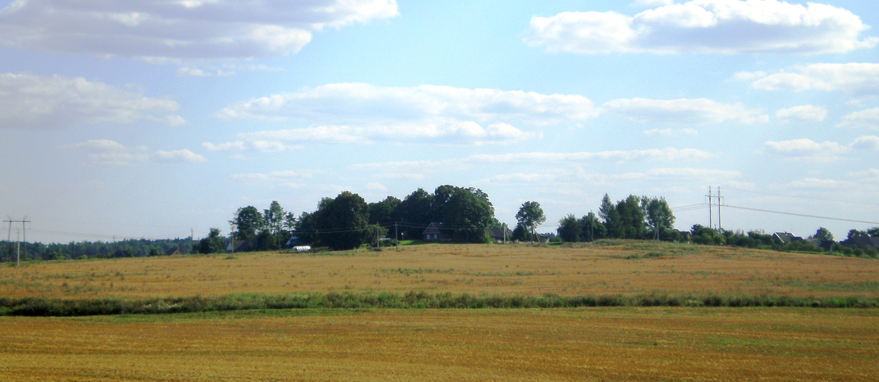 Voskaičiai, Kėdainių raj.